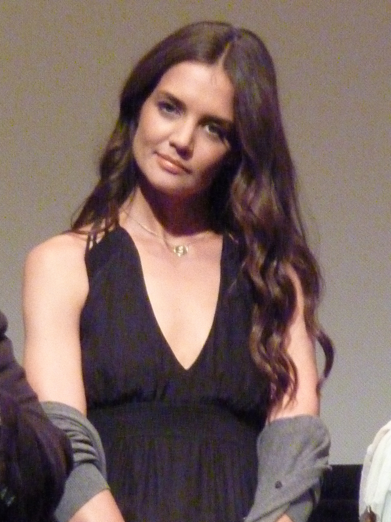 Katie Holmes in 2011